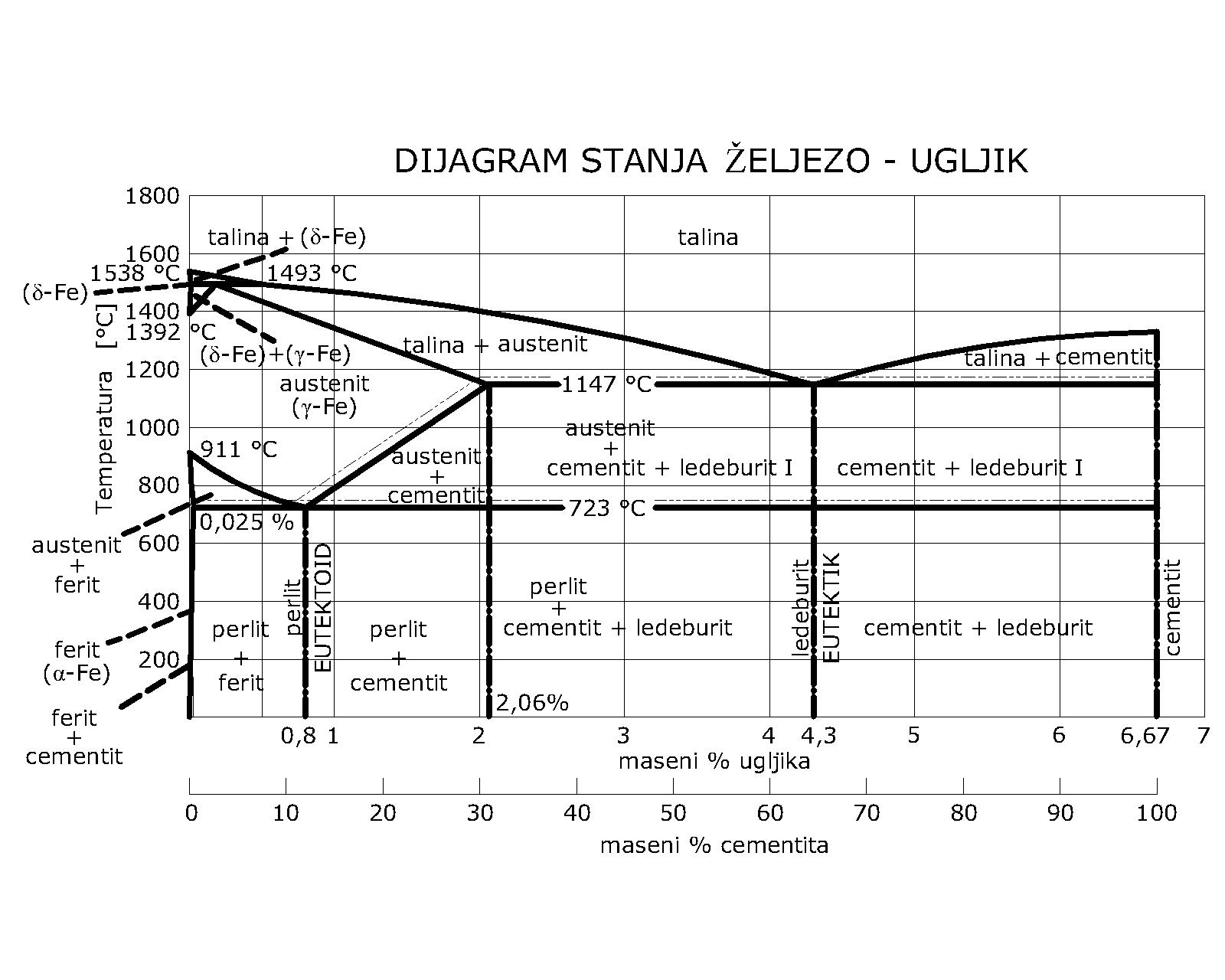 Fazni dijagram željezo-ugljik